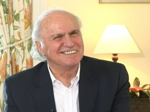 Maestro brasileiro Isaac Karabtchevsky em imagem do acervo da TV Brasil.